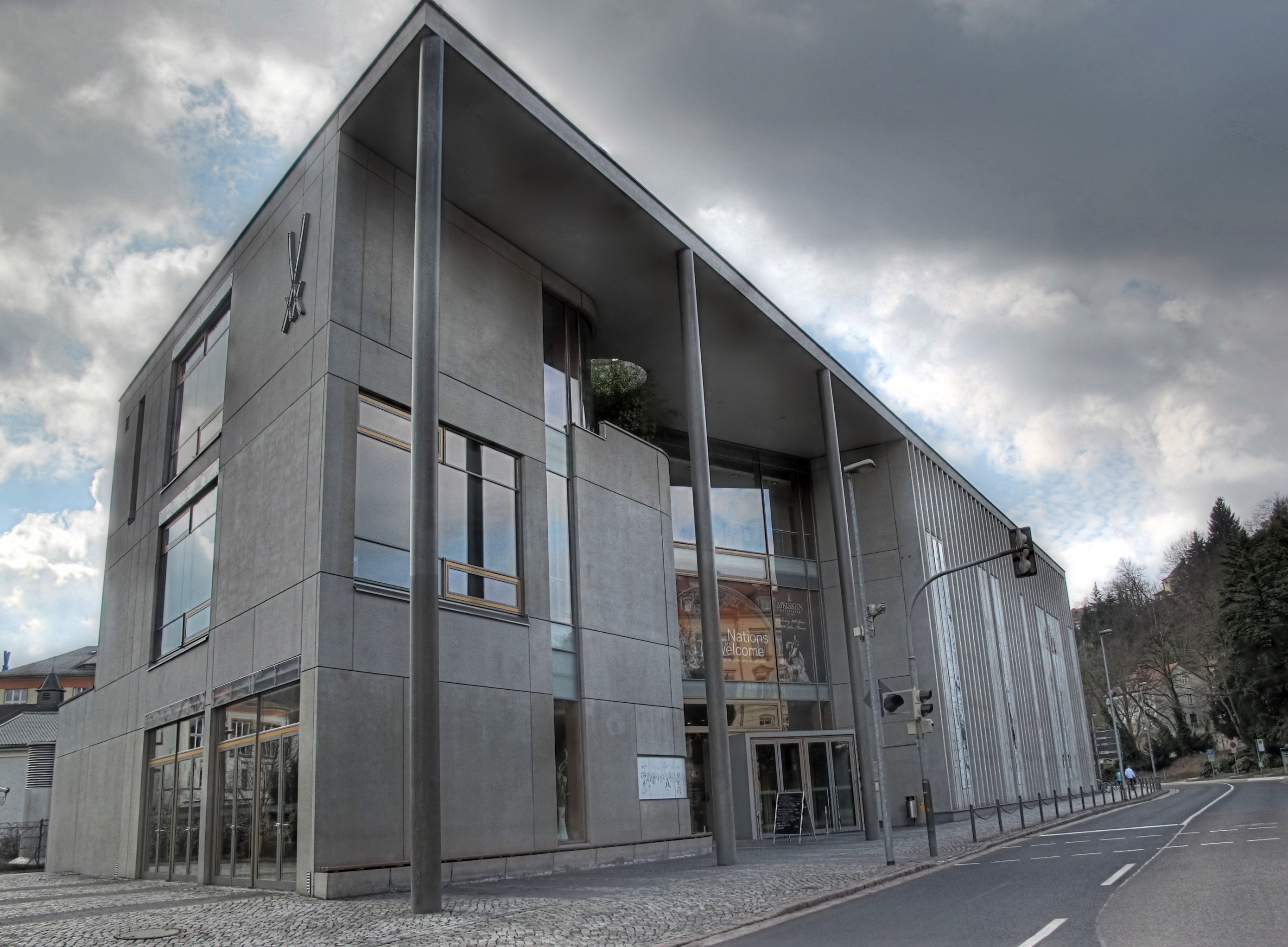 Deutschland, Sachsen, Meißen, Besucherzentrum des Museum of Meissen ART, erbaut 2005